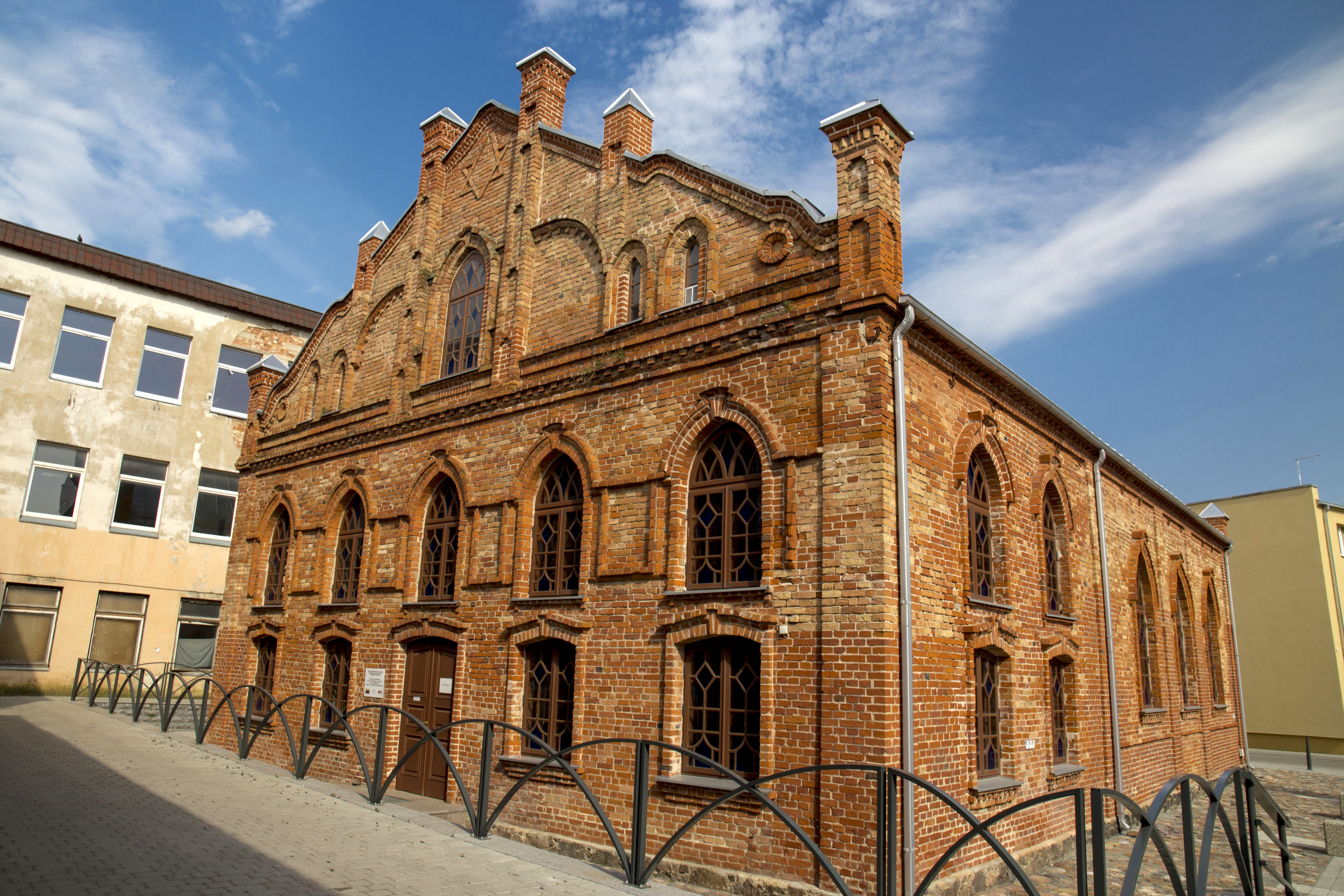 Joniskjis